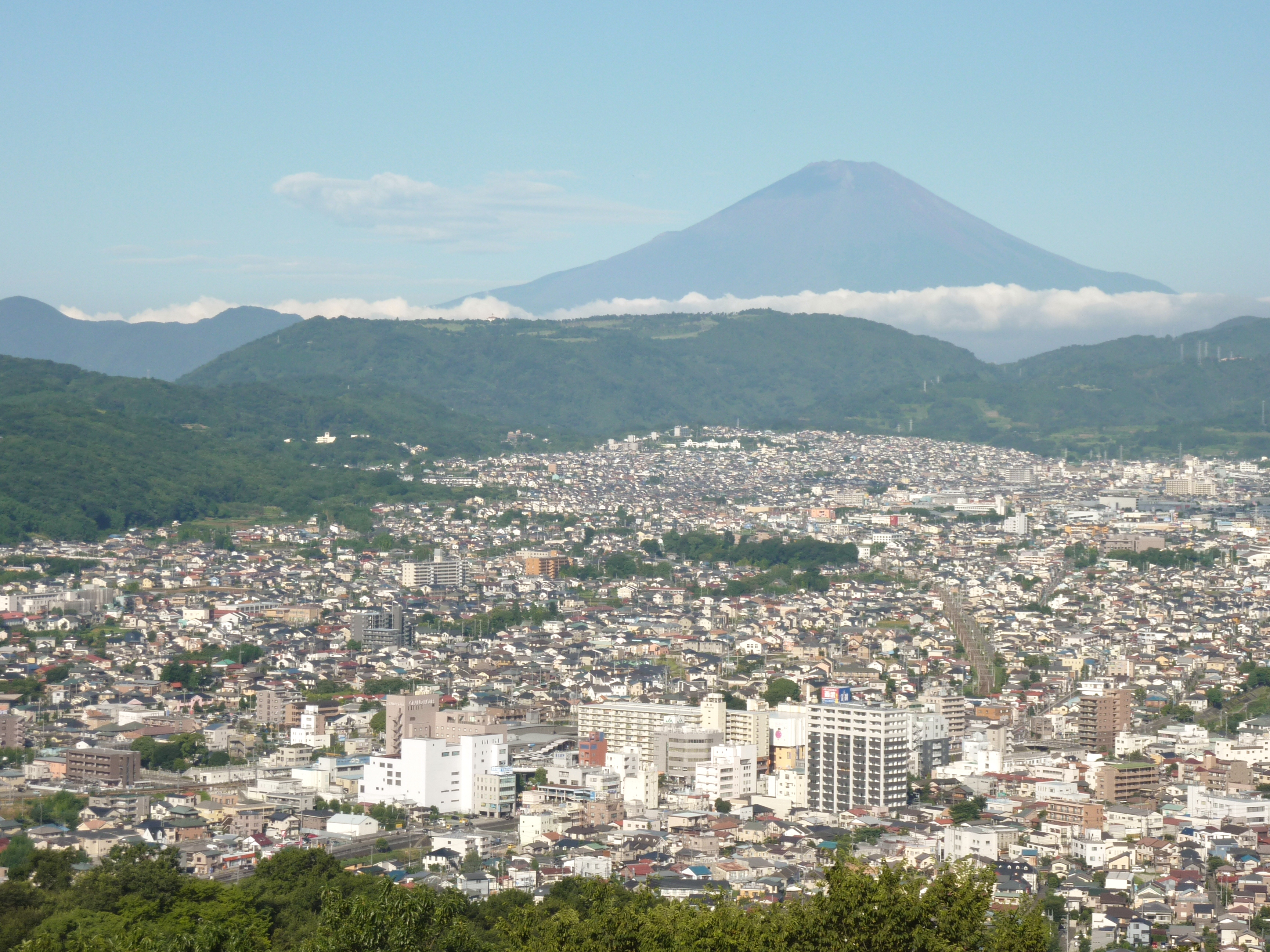 神奈川県秦野市 弘法山公園から望む秦野市街と富士山